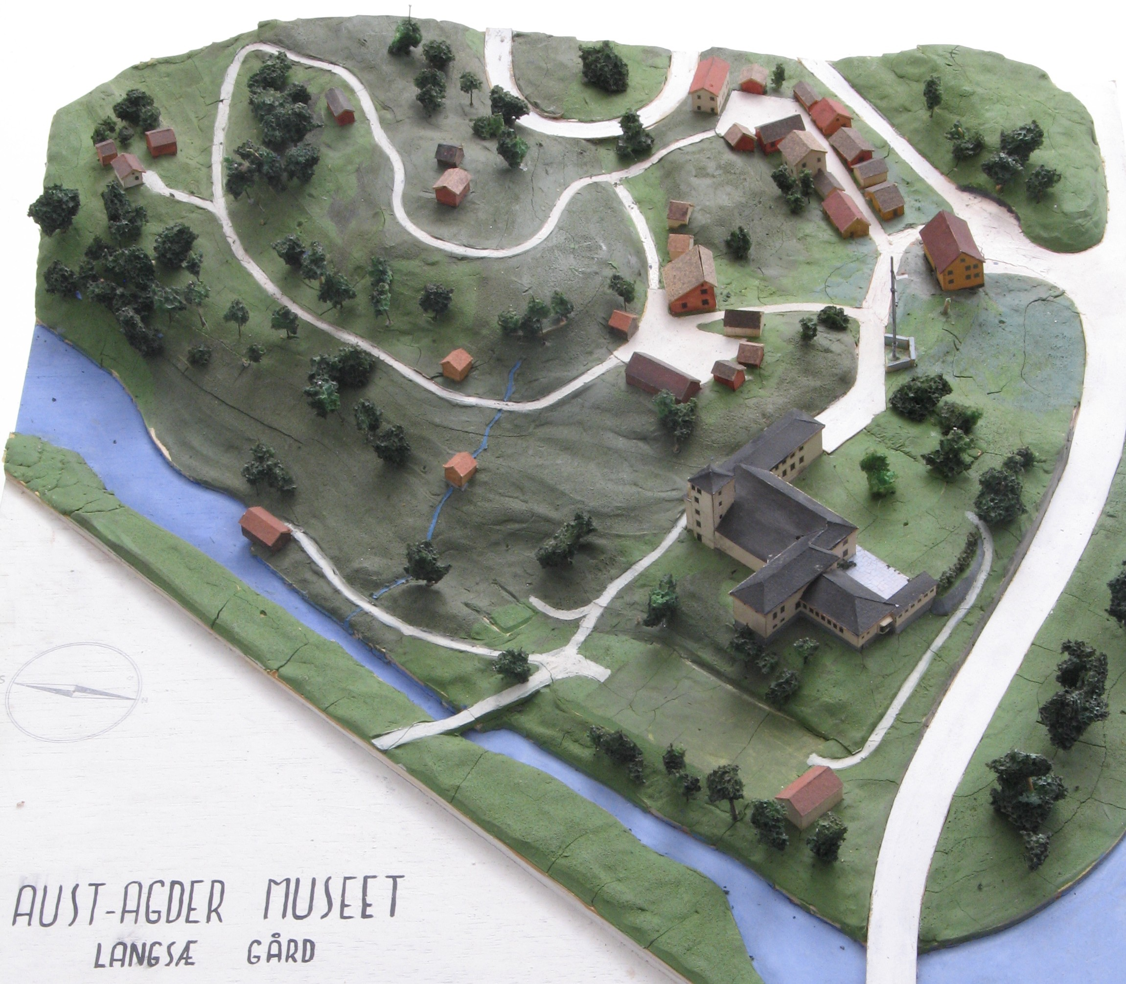 Modell av planlagt friluftsmuseum for Aust-Agder på Langsæ.